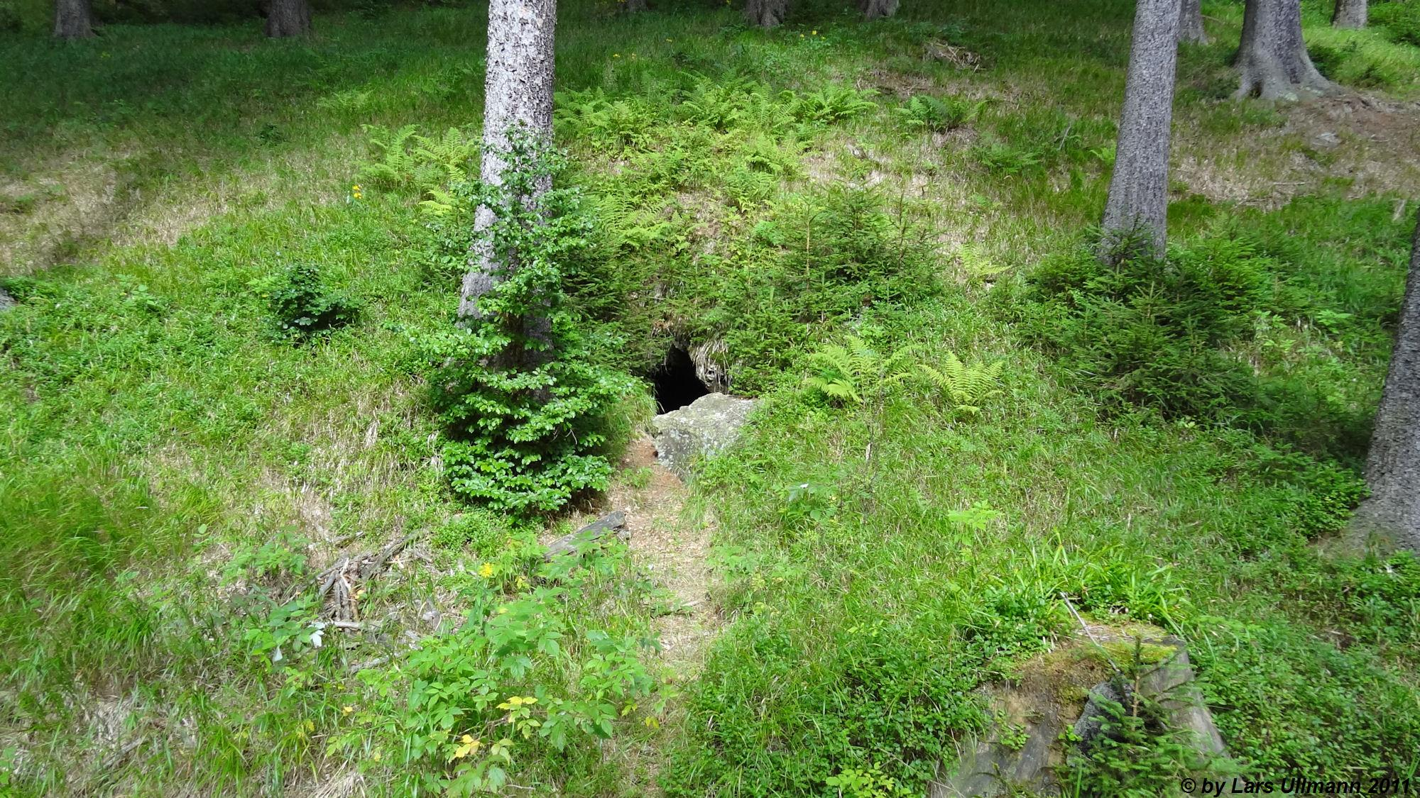 Mundloch eines alten Bergbaustollen, welcher sich in der Nähe von Erbendorf (Wüstung) bei Crottendorf in Sachsen befindet